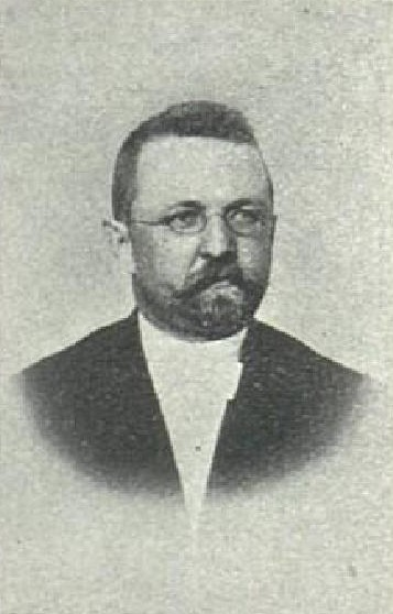 Vojtěch Prášek (1866-1920), český pedagog a politik